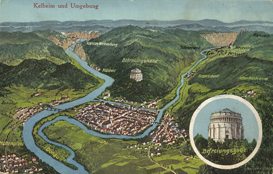 Ansichtskarte Motiv: Kelheim und Befreiungshalle